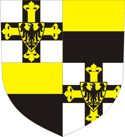 Teutonic Order - Coat of Arms of the Grandmaster Wappen des Hochmeisters des Deutschen Ordens Heinrich Dusemer